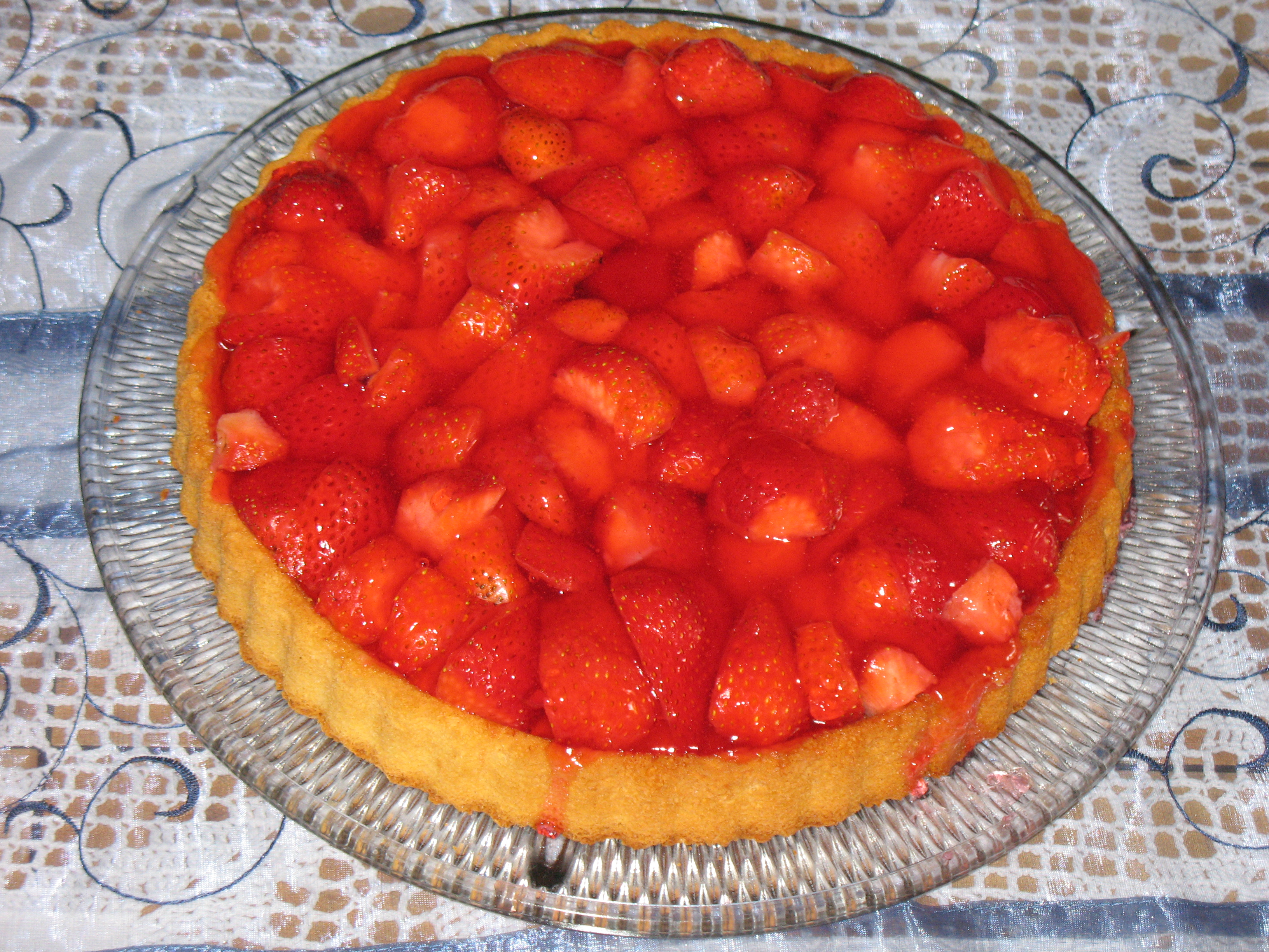 a Strawberry Pie (front) (Erdbeerkuchen (vorne))